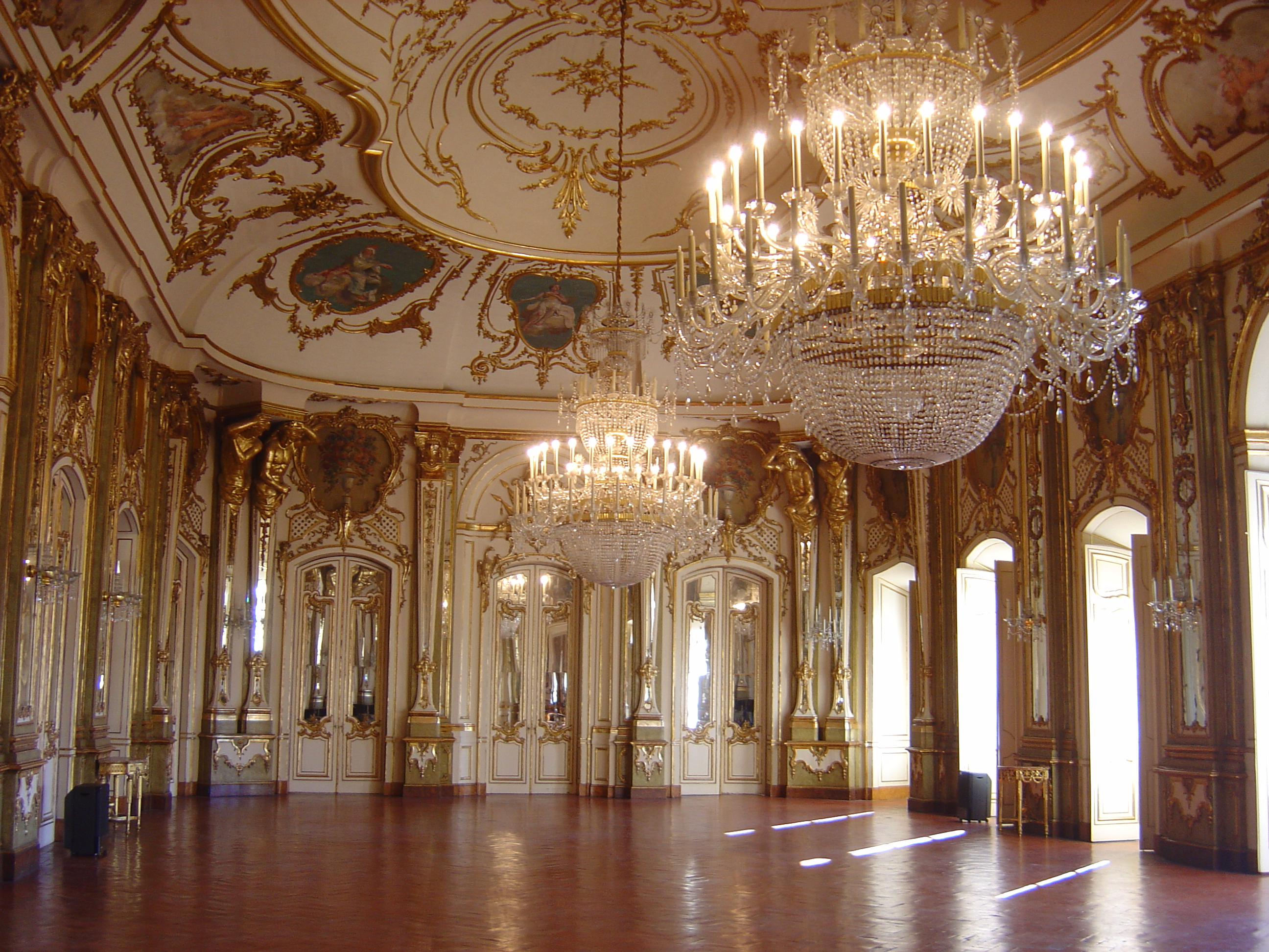 Queluz National Palace, Portugal